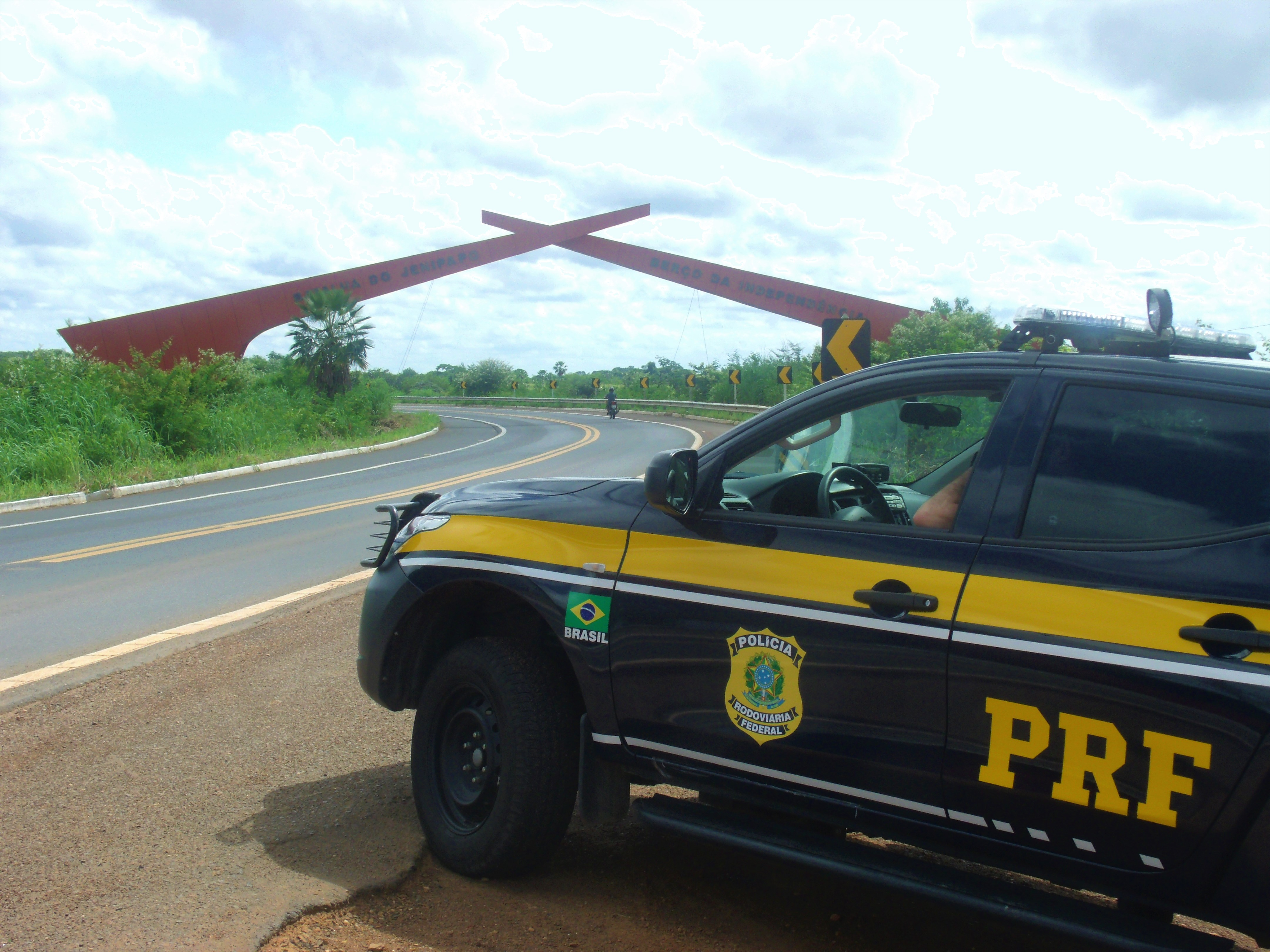 Viatura da PRF do Brasil nas proximidades do portal da Batalha do Jenipapo na BR-343.